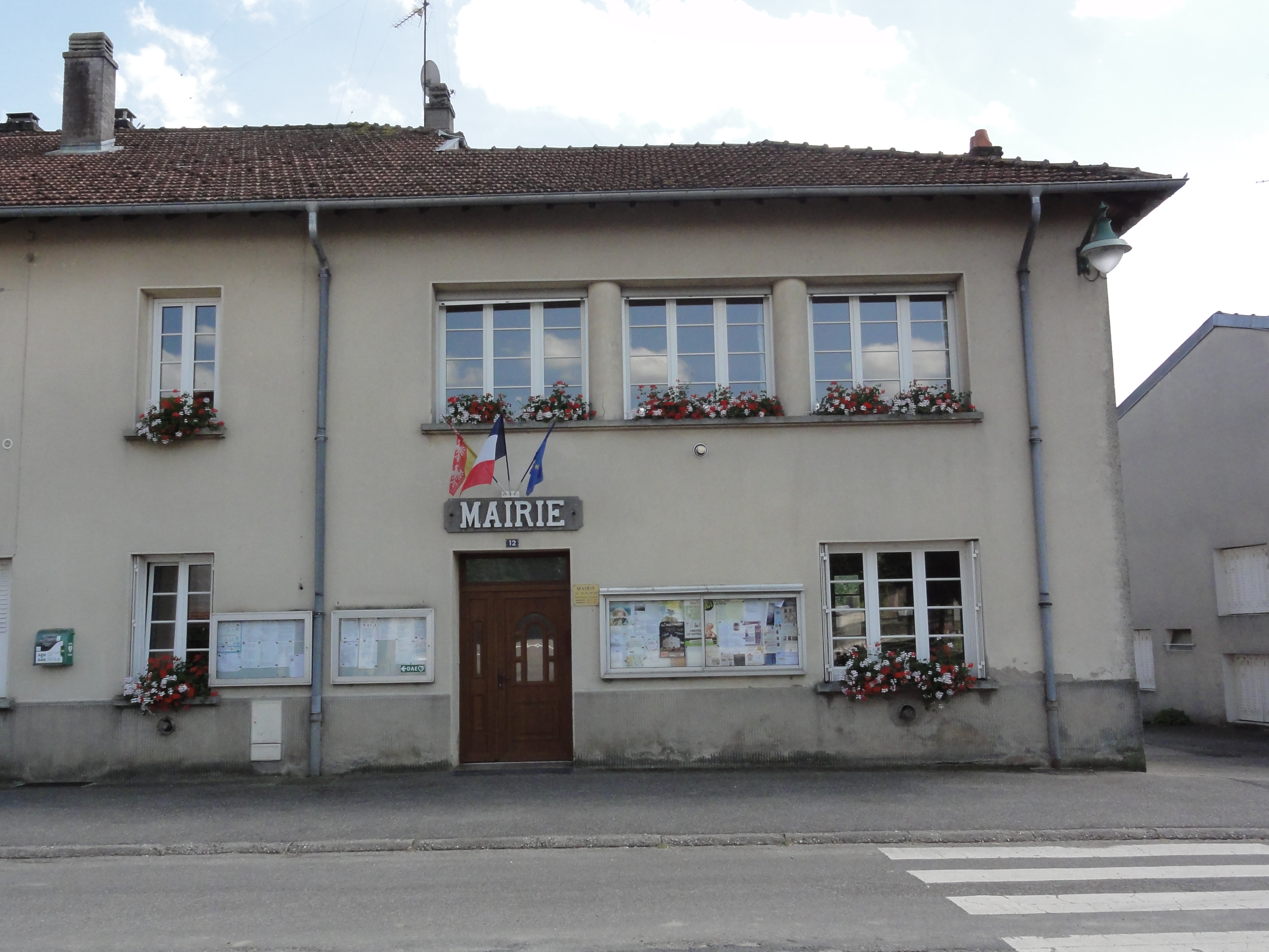 Frémonville (M-et-M) mairie